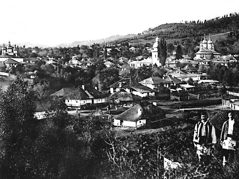 Văratic Monastery